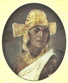 Zaque Hunzahúa